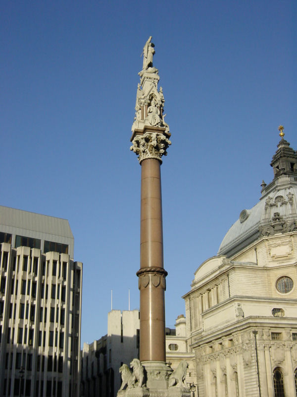 Westminster School Monument